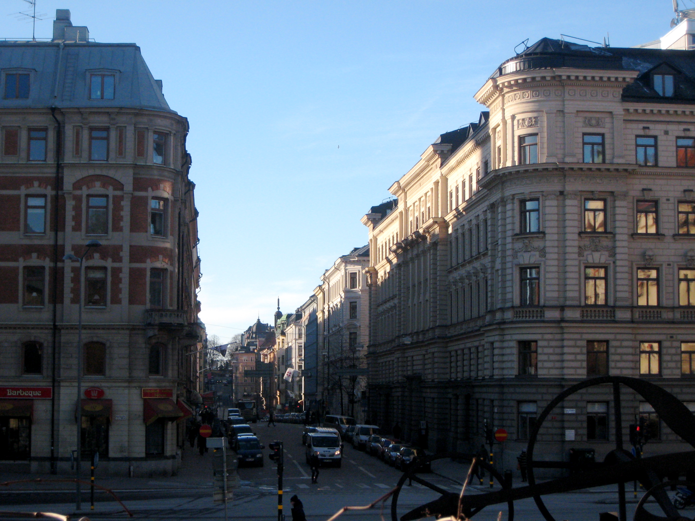 Kvarteret Hägerberget och Kvarteret Spårvagnen